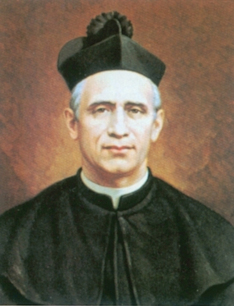 Beato Giovanni Piamarta